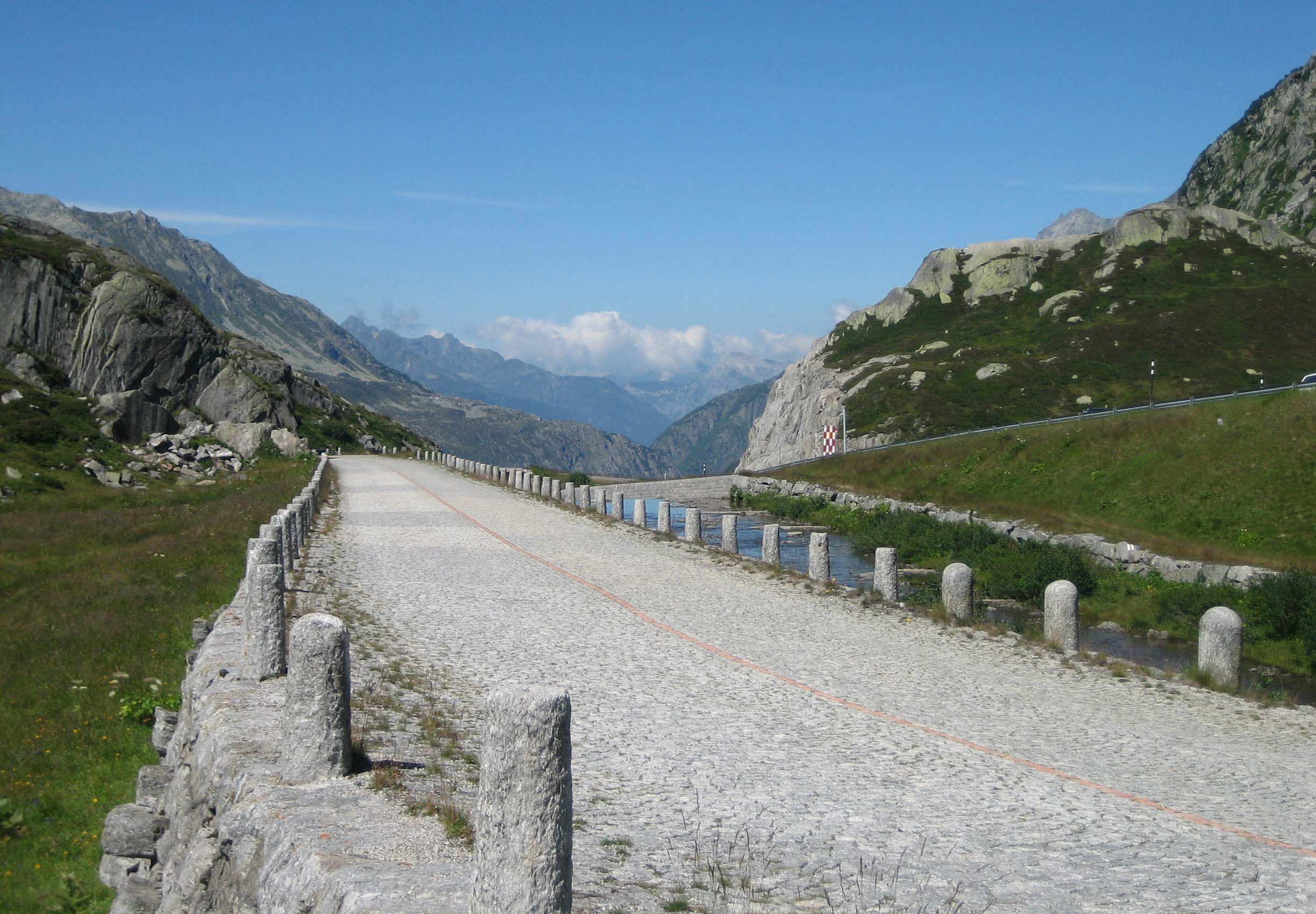 Alte Chaussee über den Sankt Gotthard nördlich des Hospiz, erbaut 1827–1830